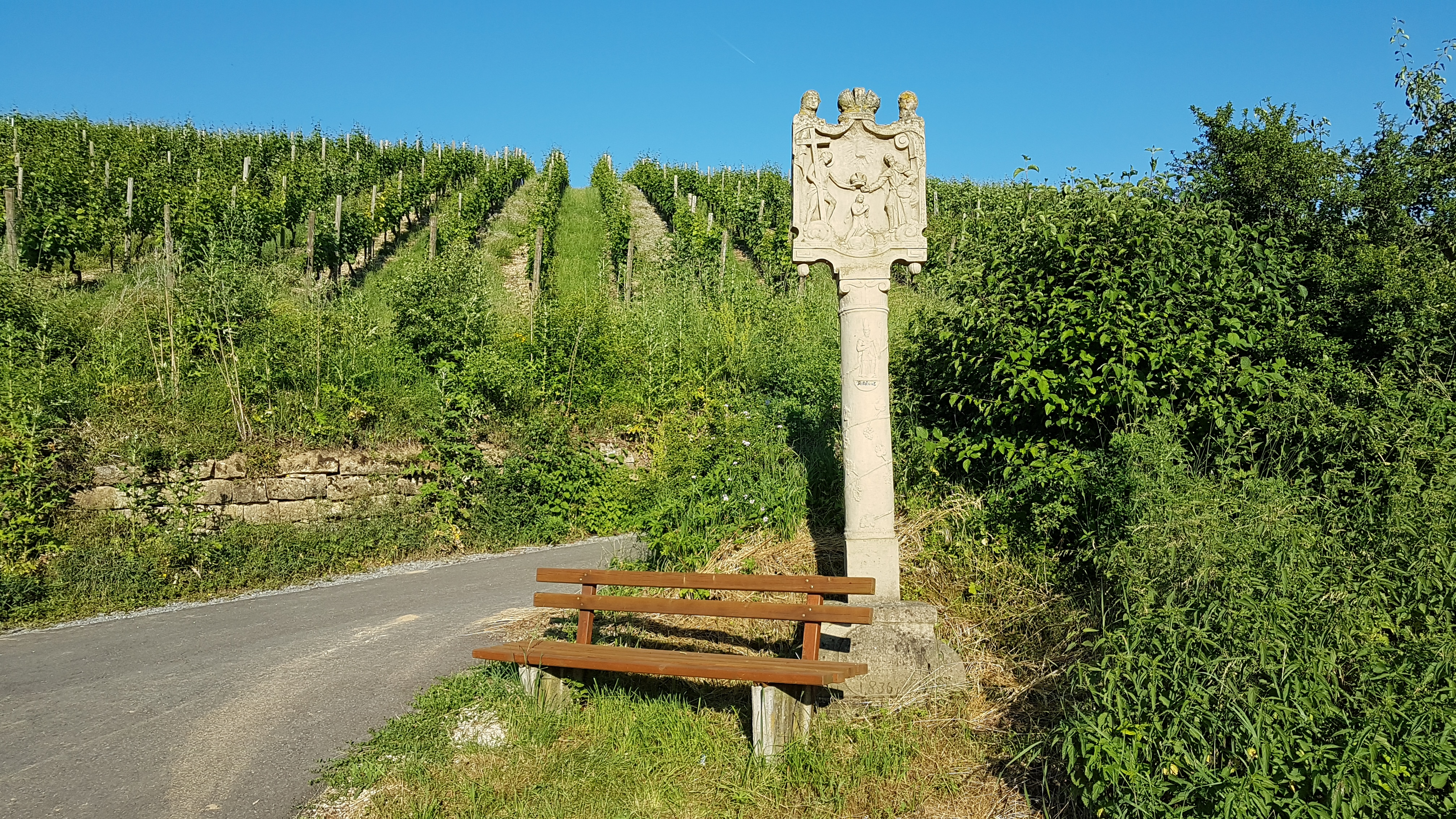 Kleindenkmal Nr. 04 (Beckstein): Bildstock im Empire-Stil mit Marienkrönung und Dreifaltigkeit; auf der Rundsäule St.-Nikolaus-Relief als Hinweis auf den Stifter Nikolaus Mohr. Auch: Bildstock „Emmelesbild“. Der Bildstock befindet sich in der Lage Kirchberg, Großlage Becksteiner Tauberklinge.